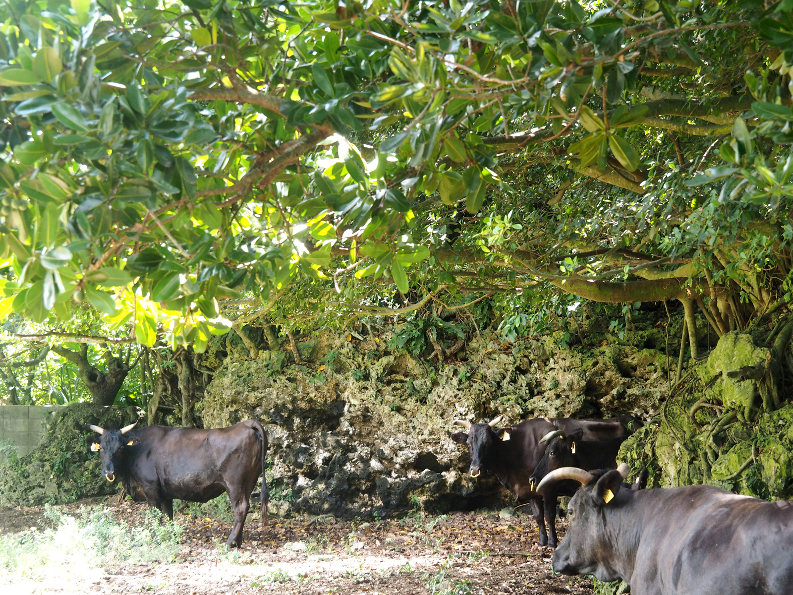 高こるせ石（たかこるせいし） 天然記念物「石垣島東海岸の津波石群」のひとつ（沖縄県石垣市石垣島）